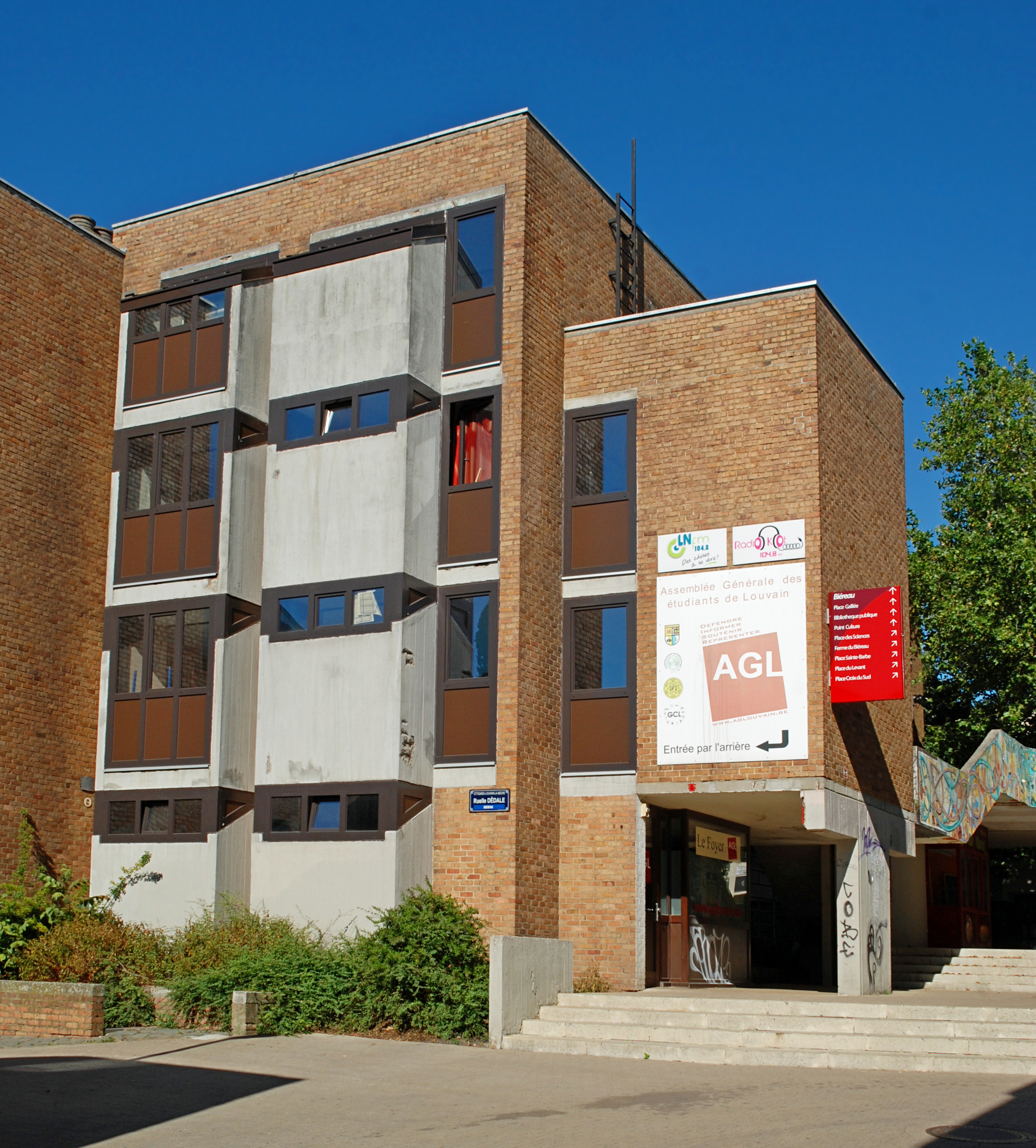 Belgique - Louvain-la-Neuve - Rue des Wallons - siège de l'AGL This photo of immovable heritage has been taken in the Walloon Region